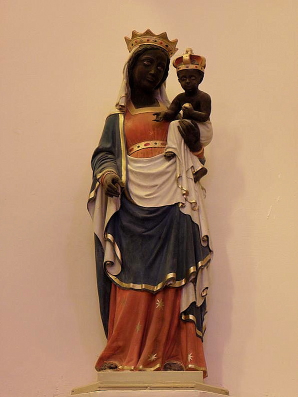 Église Saint-Jean-Baptiste de Saint-Jouan-des-Guérets (35). Statue de Notre-Dame-de-Bonne-Délivrance.